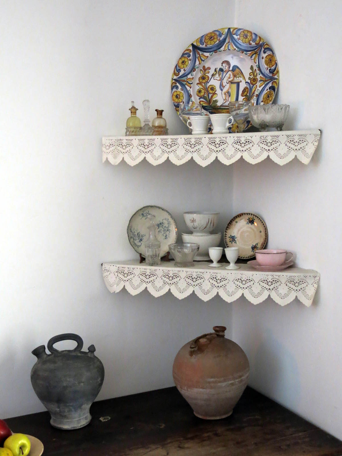 Casa Prat de la Riba (Castellterçol) Object location41° 45′ 05.38″ N, 2° 07′ 10.01″ E